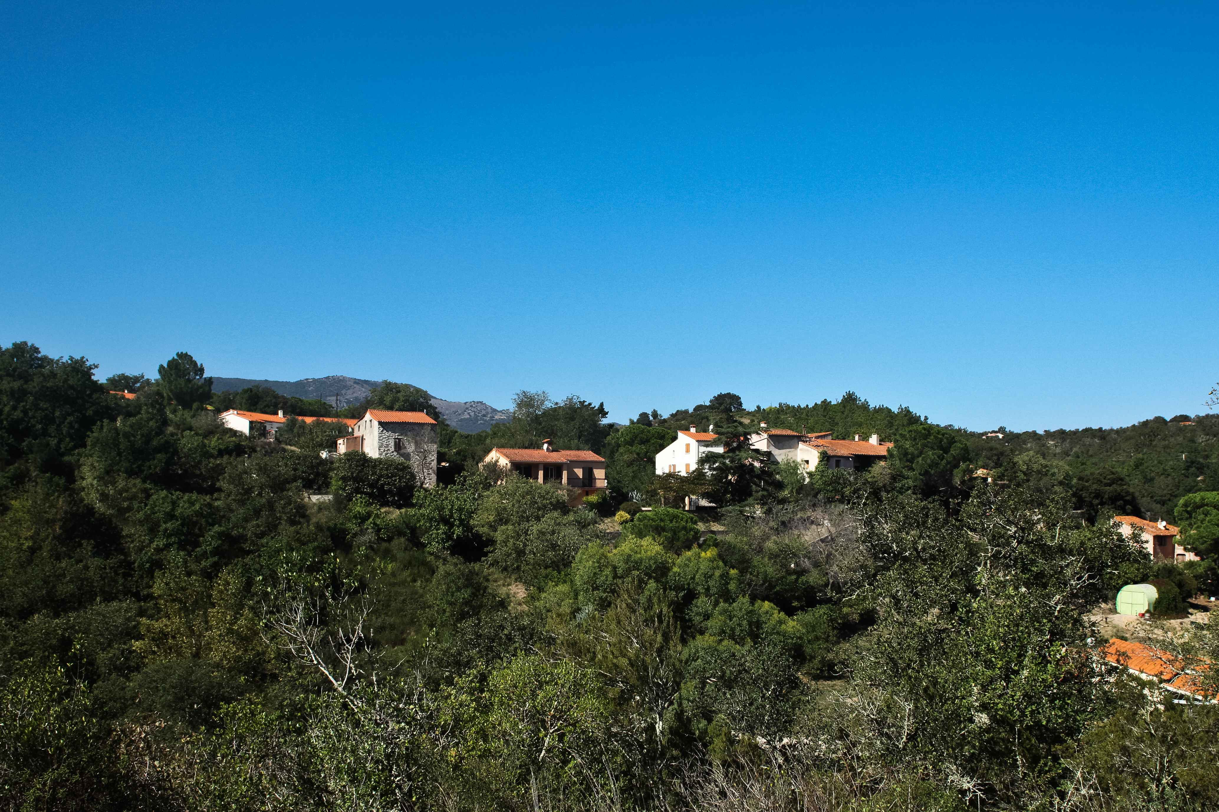 Village de Montauriol, face à l'église Saint-Saturnin